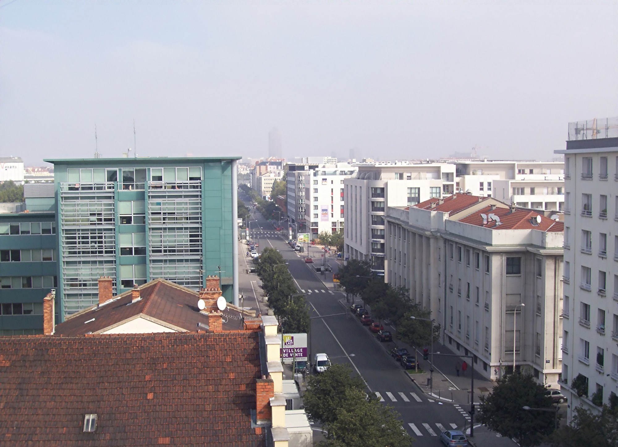 l'avenue Jean-Jaurès vers le Nord, Lyon (Rhône, Rhône-Alpes).